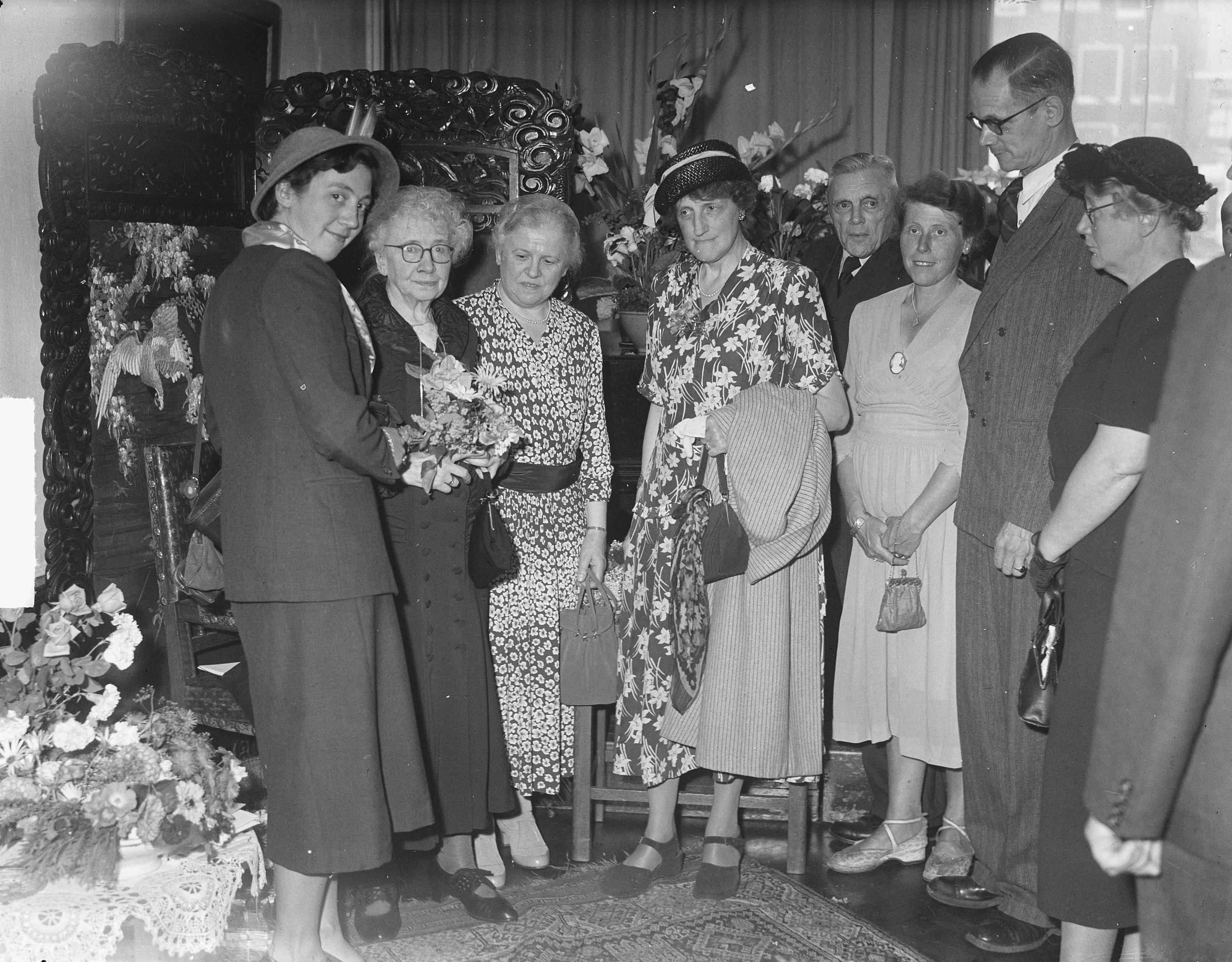 Collectie / Archief : Fotocollectie Anefo Reportage / Serie : [ onbekend ] Beschrijving : Marie van Zeggelen 80 jaar. Annotatie : Marie van Zeggelen was een schrijfster Datum : 8 juli 1950 Trefwoorden : bloemen, felicitaties, gezelschappen Persoonsnaam : Zeggelen, Marie van Fotograaf : Pot, Harry / Anefo Auteursrechthebbende : Nationaal Archief Materiaalsoort : Glasnegatief Nummer archiefinventaris : bekijk toegang 2.24.01.09 Bestanddeelnummer : 904-0663